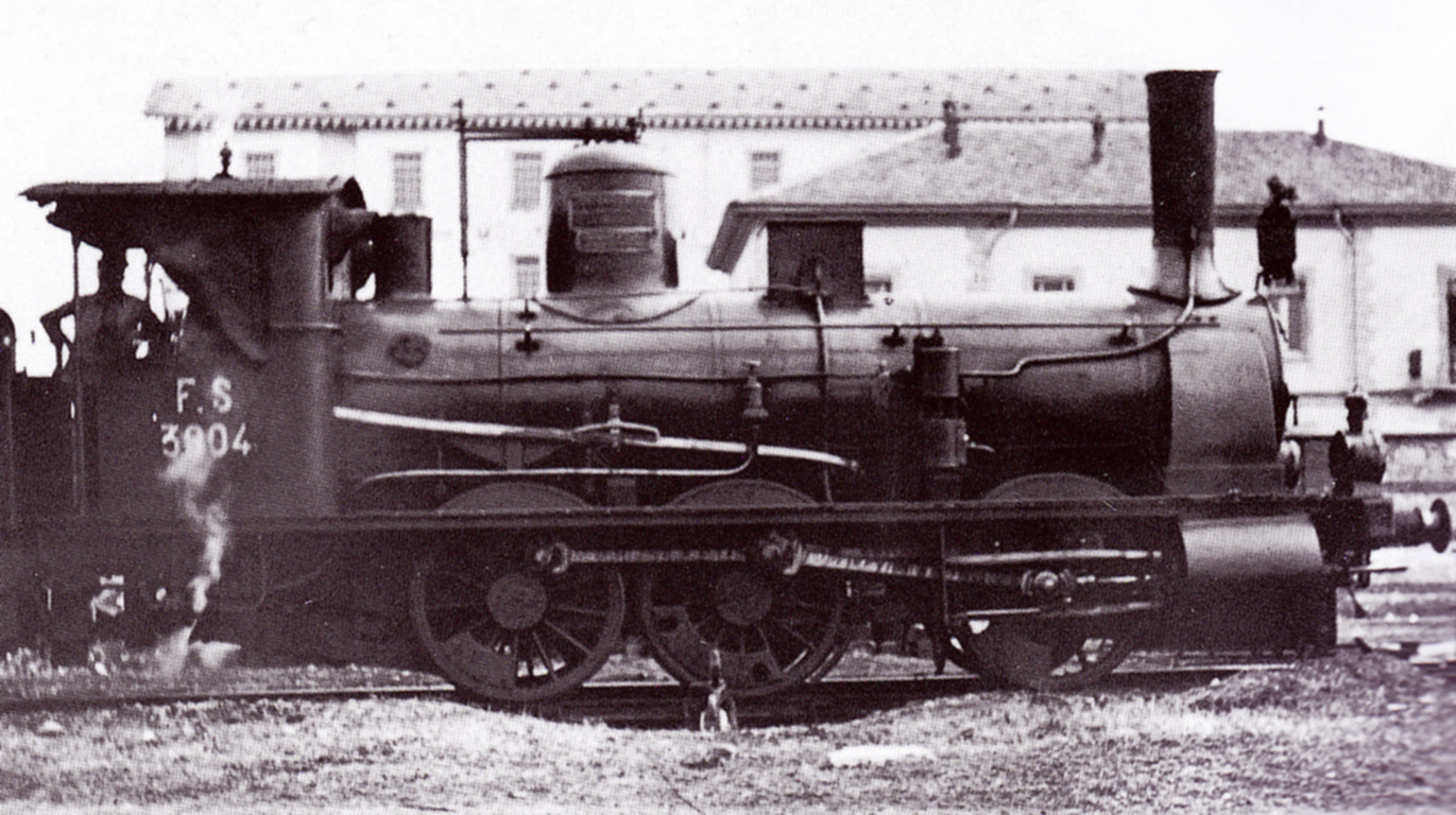 Locomotiva FS n. 3004, appartenente al primo gruppo 300 (dal 1907 gruppo 255), in sosta in località imprecisata.